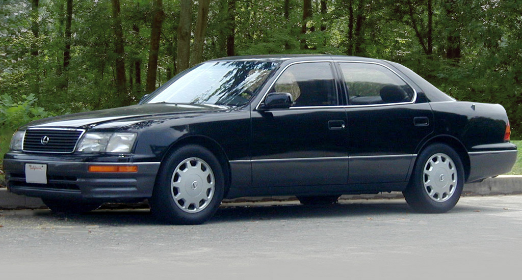 Lexus LS 400 (1995–1997).